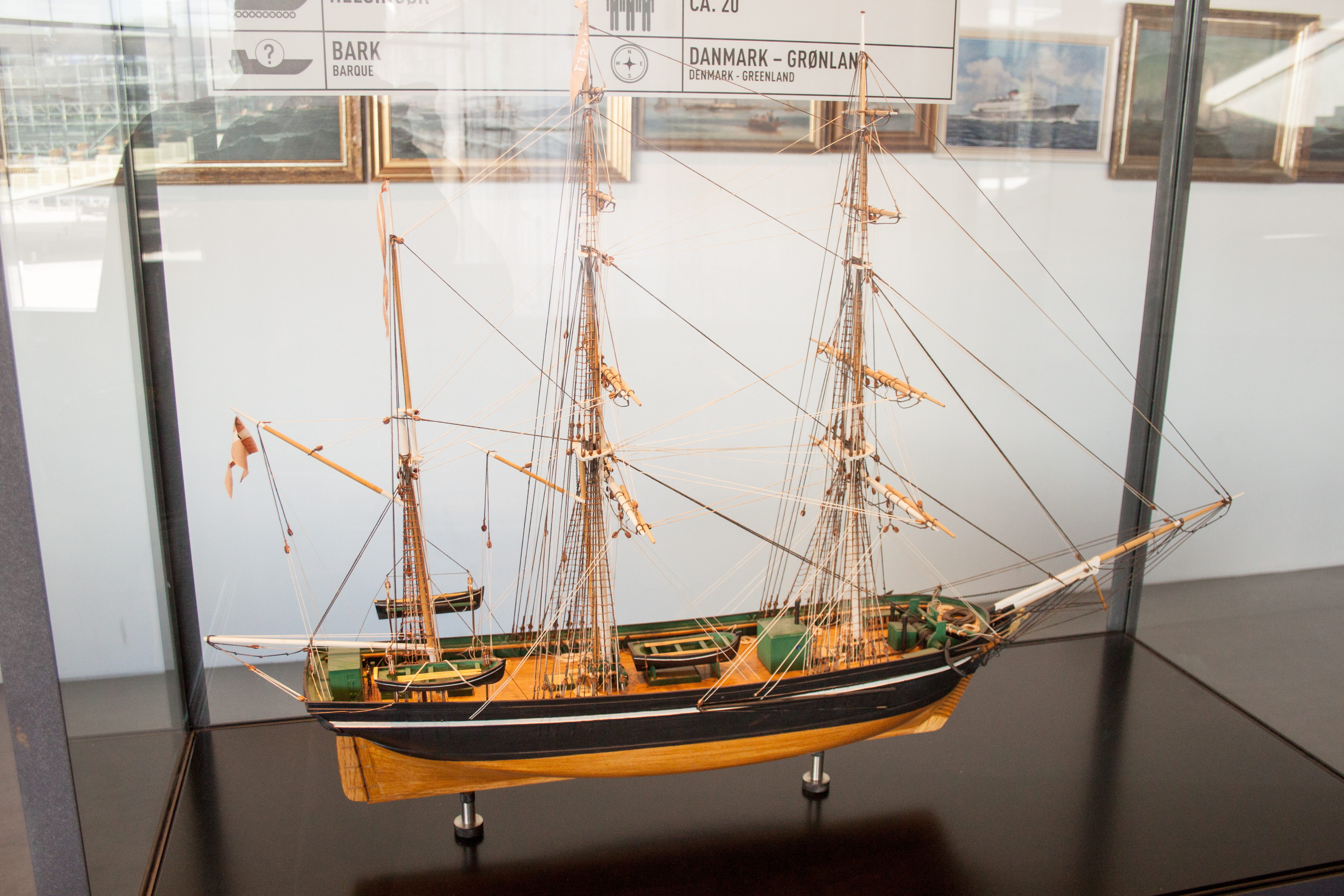 Model_of_the_barque Norlyset (1852-1926)label QS:Len,"Model_of_the_barque Norlyset (1852-1926)" label QS:Lhu,"Norlyset, bark modellje. Az 1852-ben épült hajó 1926-ig közlekedett Dánia és Grönland között"